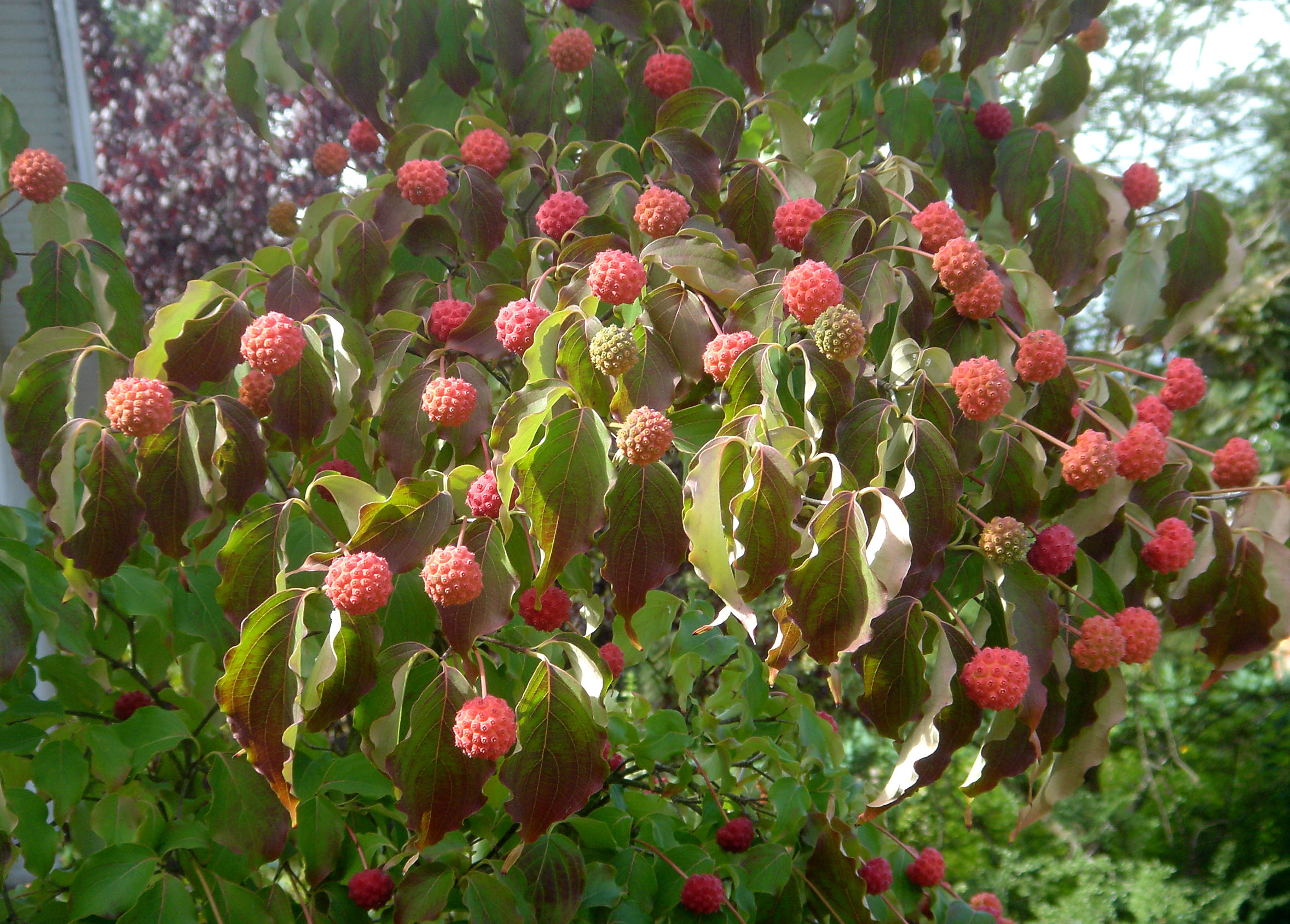 Cornus kousa var. chinensis. Photo taken in Belgium